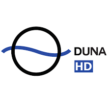 Logó HD adás közben